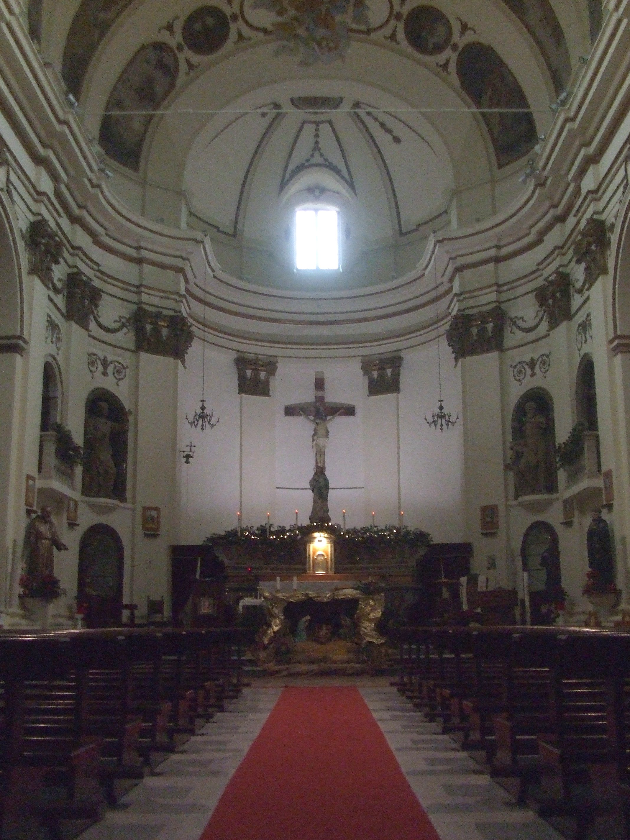 Interno chiesa di Bisenti